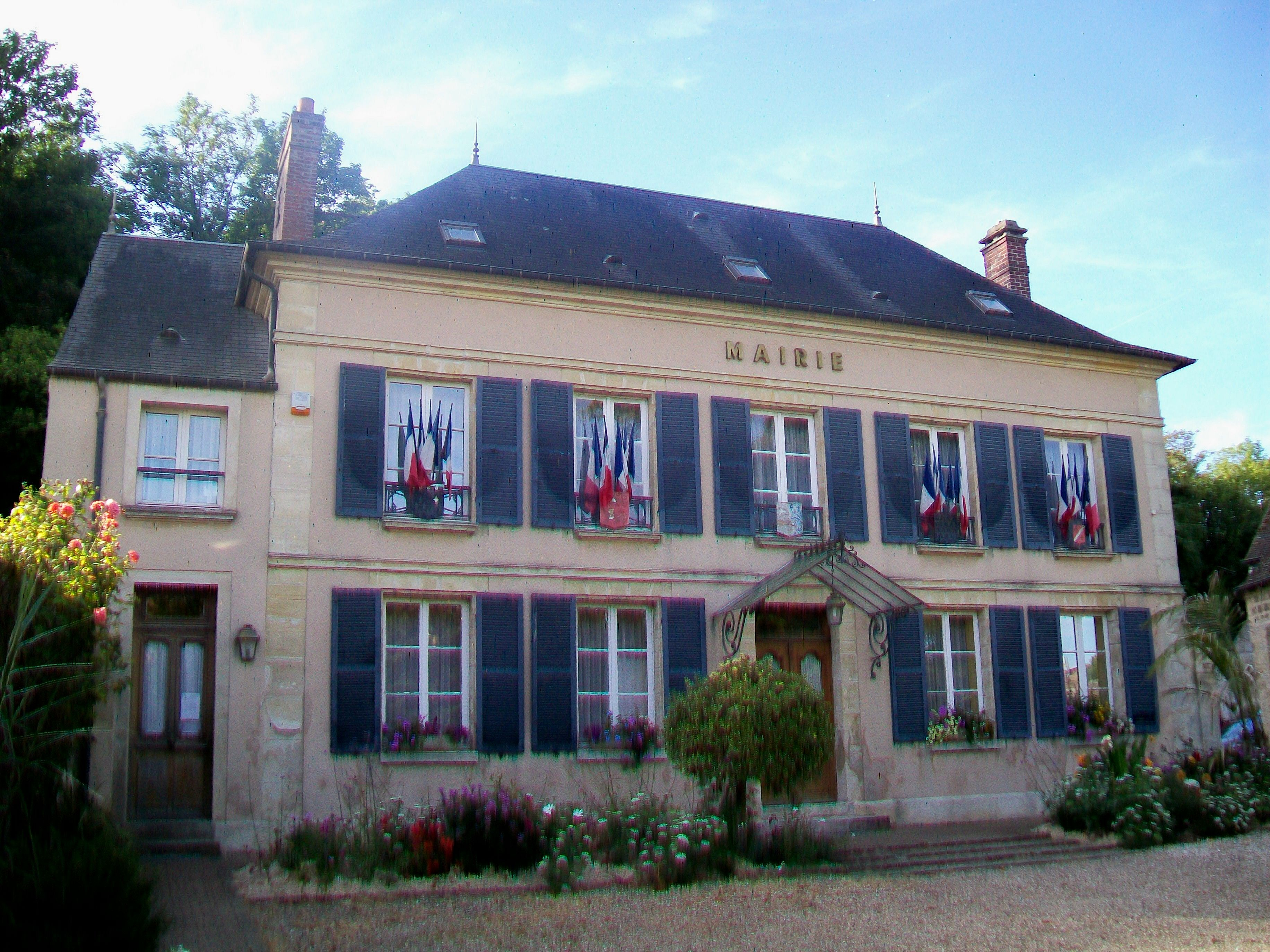 La mairie, façade sur la place Rollon.